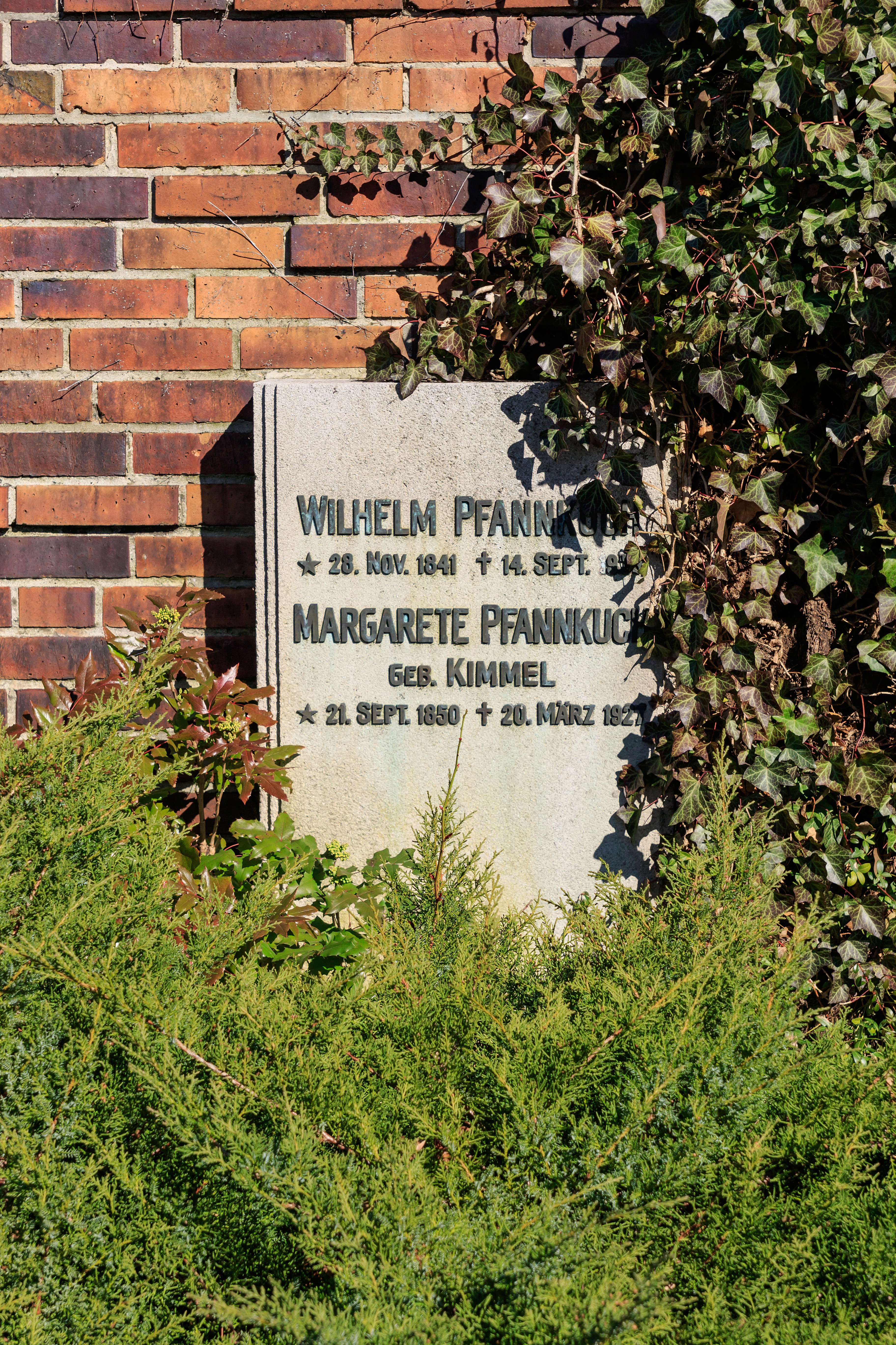 Zentralfriedhof Friedrichsfelde, Berlin-Lichtenberg. Gedenkstätte der Sozialisten, Grab von Wilhelm Pfannkuch.